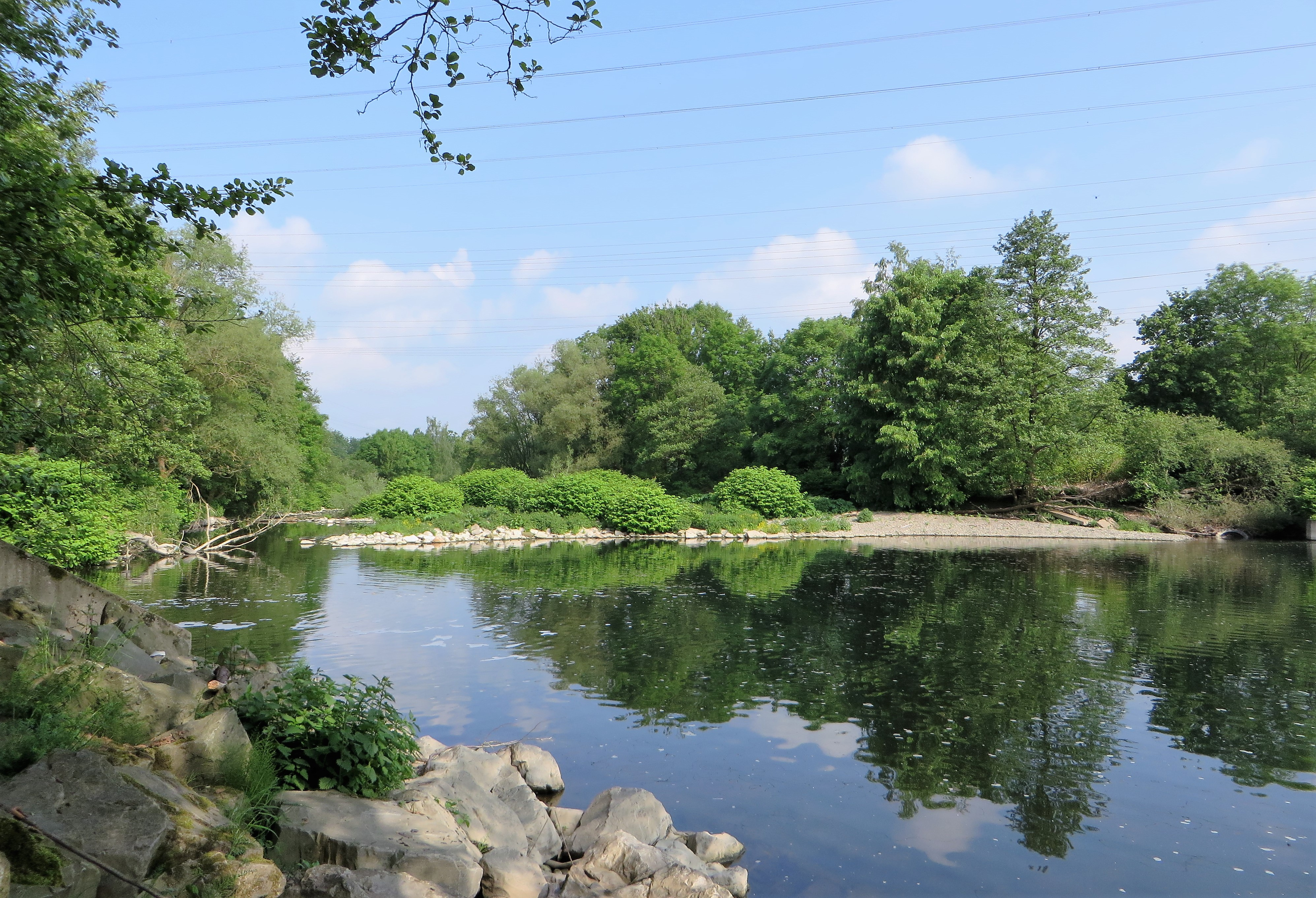 Naturschutzgebiet „Lenneaue Kabel“ (HA-008) in Hagen-Kabel, entlang der Lenne zwischen Schwerter Straße im Norden und Fleyer Bach im Süden. Es handelt sich um Uferzonen mit ausgeprägter Ufervegetation, Feuchtwiesen, einzelnen Althölzern und Auenwaldresten. Foto in Höhe des Lennewehrs Kabel.